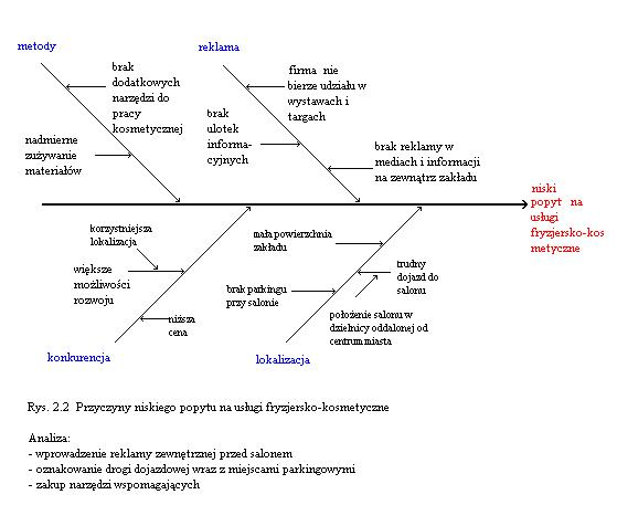 Przyklad zastosowania diagramu Ishikawa Wykonała: Anna Pokorska (username: surin)